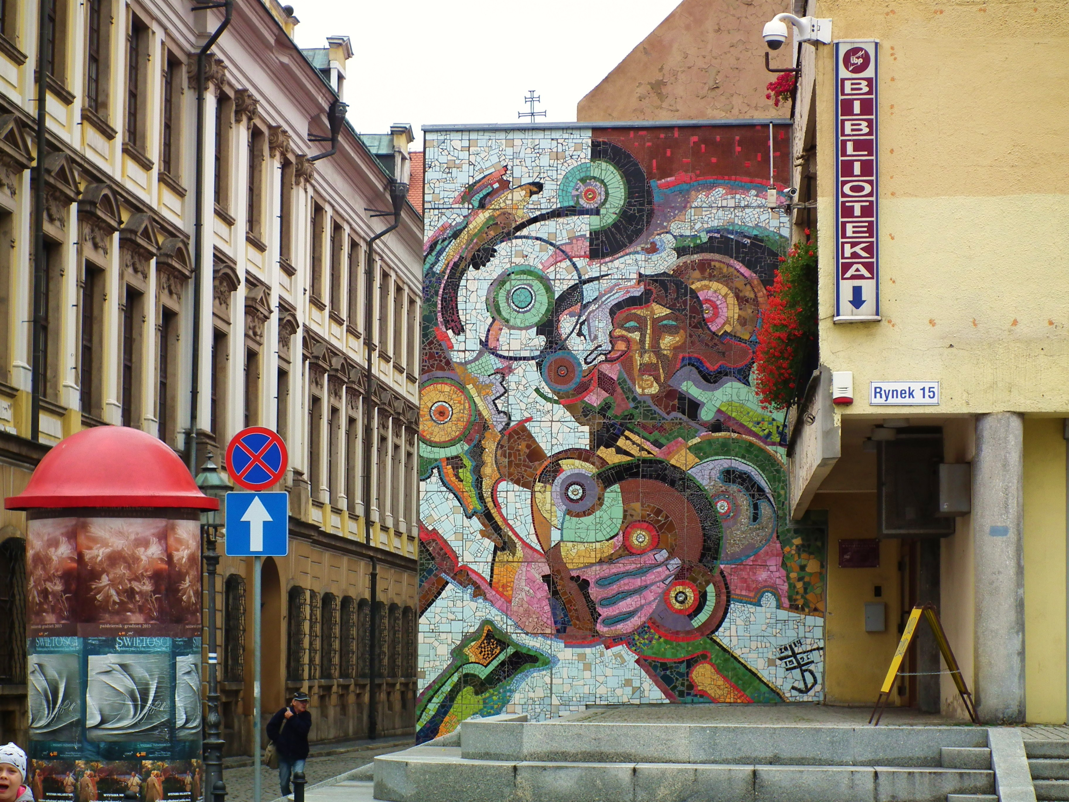 Legnica - mozaika kopernikańska w Rynku.